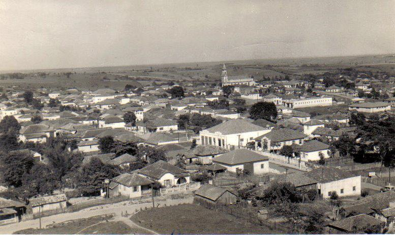 Vista parcial da cidade de Pirapozinho na década de 1960.